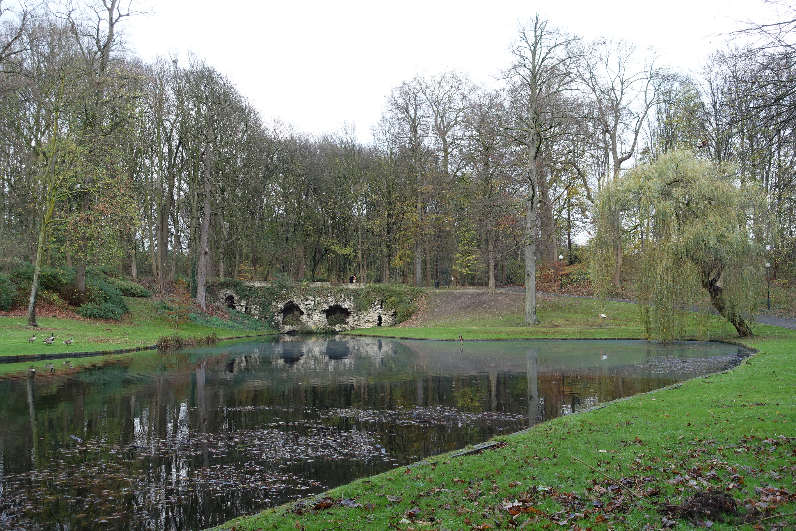 Bloedgrotten in Domein Drie Fonteinen, vanuit het zuiden